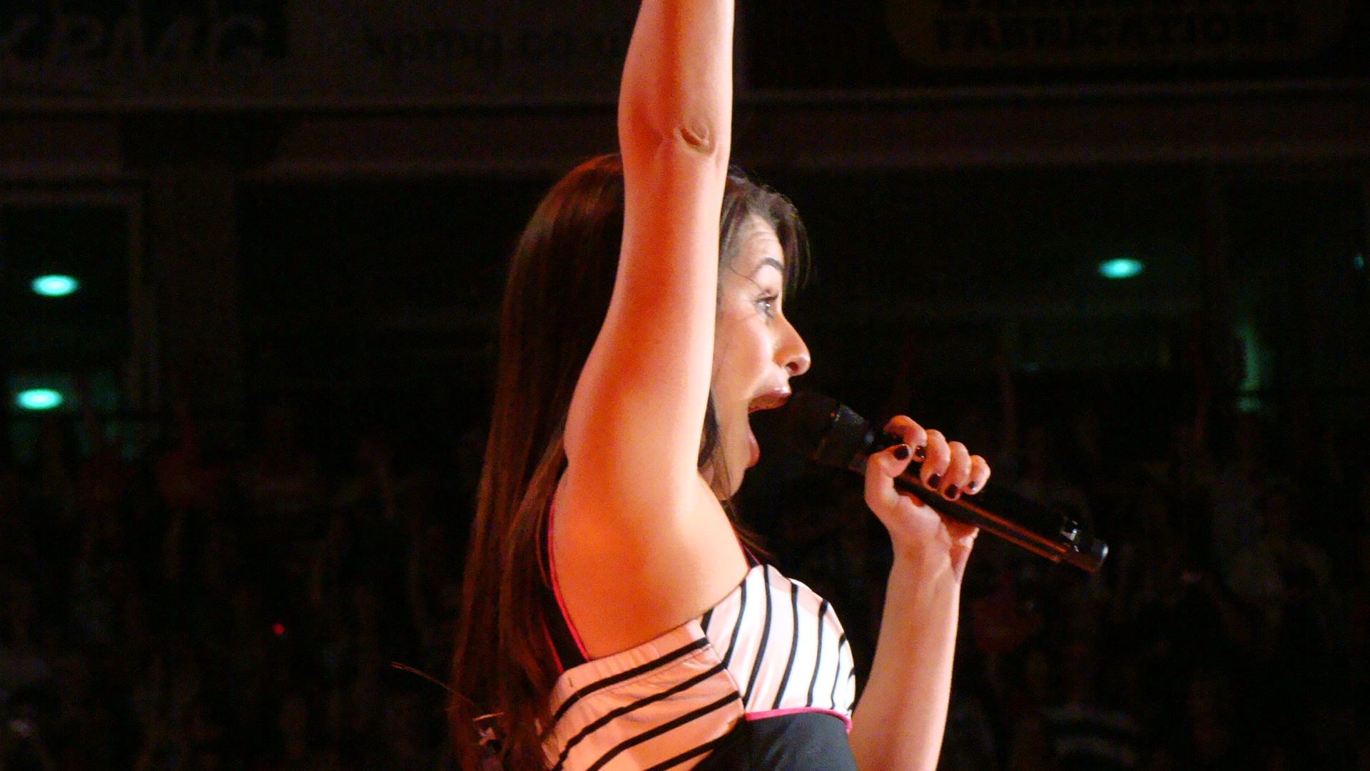 Firework